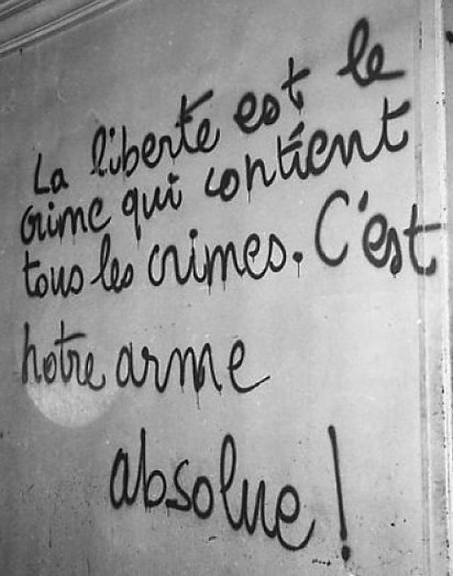 Mur (Sorbonne ?) : "La liberté est le crime qui contient tous les crimes. C'est notre arme absolue !" - Photographie, 6 x 6 cm - BnF, département Philosophie, histoire, sciences de l'homme, Lb61-600 (Tracts mai 1968).